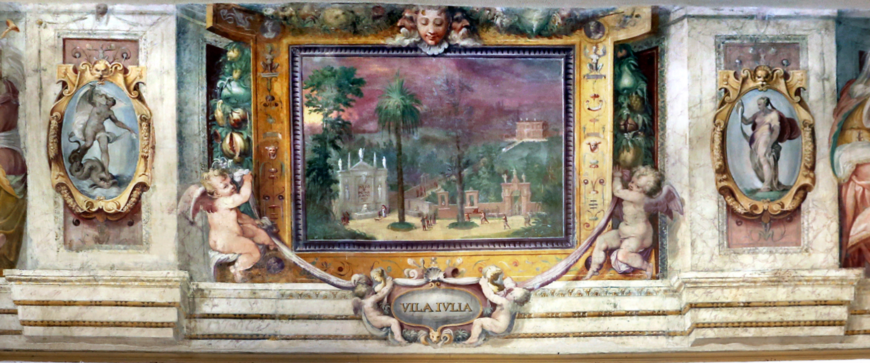 Villa Giulia (Rome) This is a photo of a monument which is part of cultural heritage of Italy.